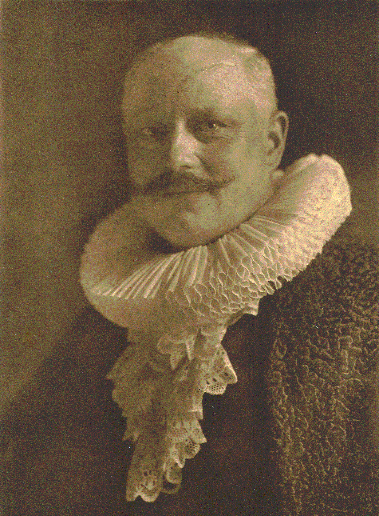 Adolf Buehl, hamburgischer Staatsrat